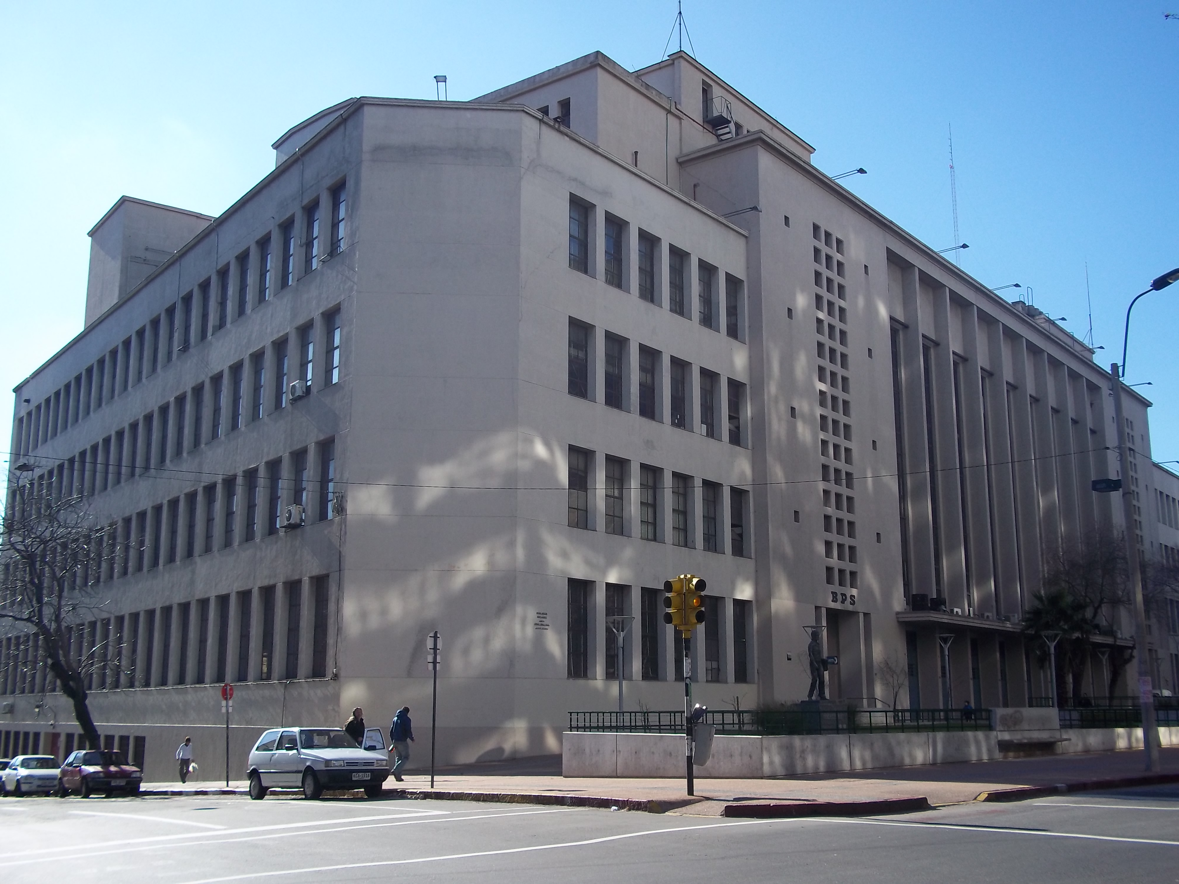 Edificio del Banco de Previsión Social (BPS), Montevideo, Uruguay